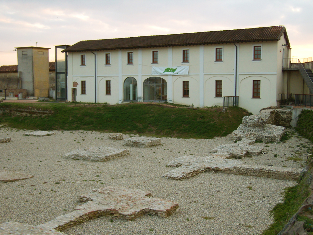 Il cosiddetto "Conventino" di Lodi Vecchio (LO), costruito sui resti della facciata della Cattedrale di Santa Maria, e oggi adibito a museo archeologico.